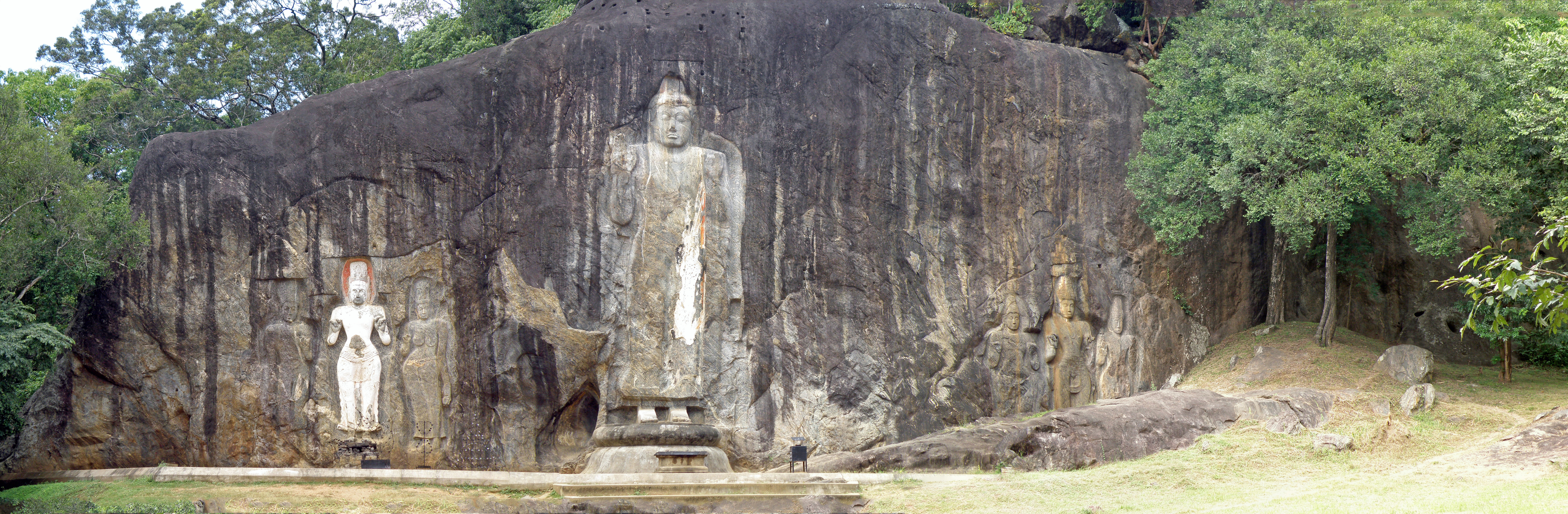 Buduruwagala - Vue générale panoramique